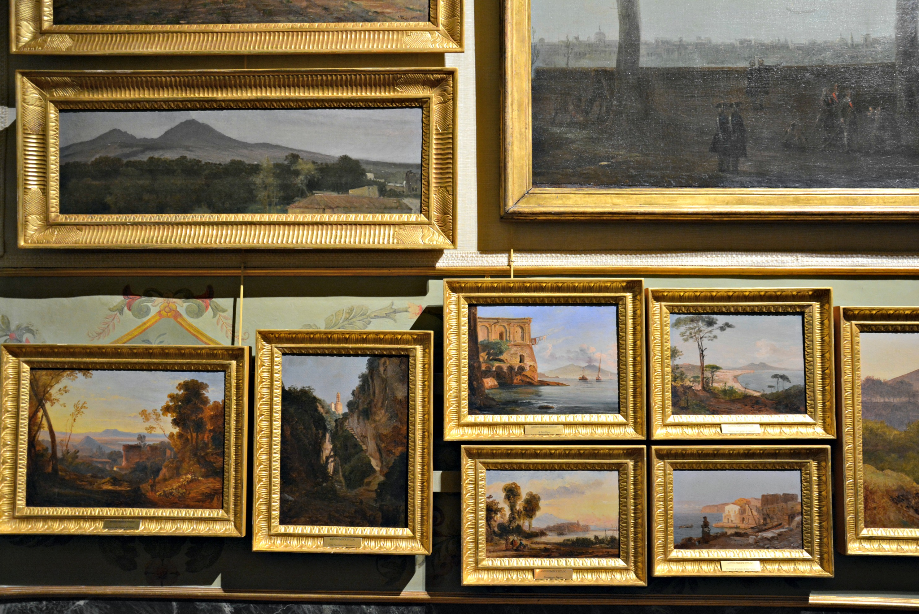 Vedi titolo